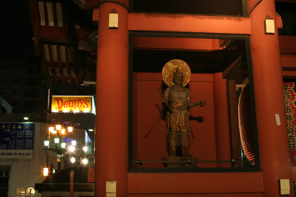 Asakusa, Tokyo Japan